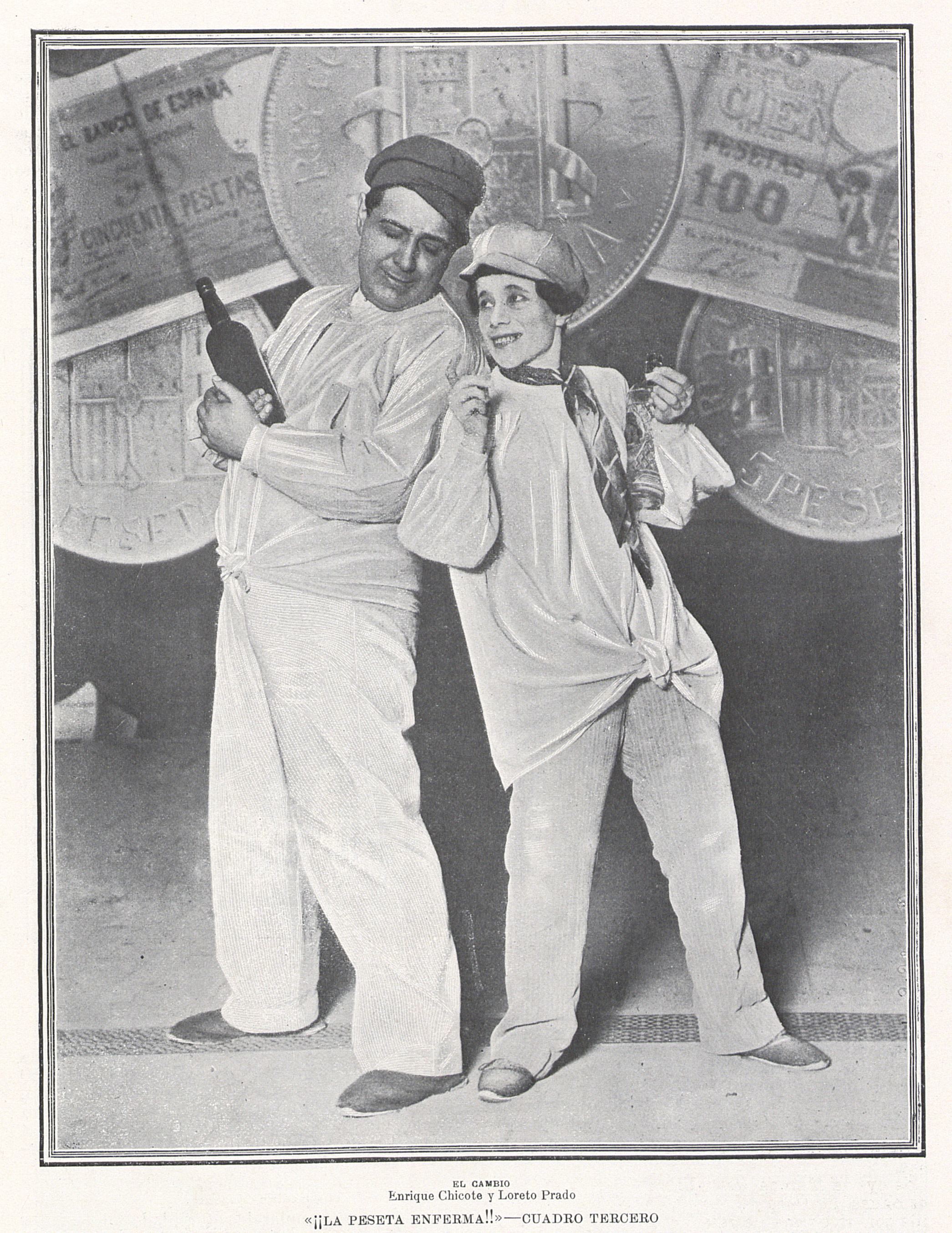 Enrique Chicote y Loreto Prado.